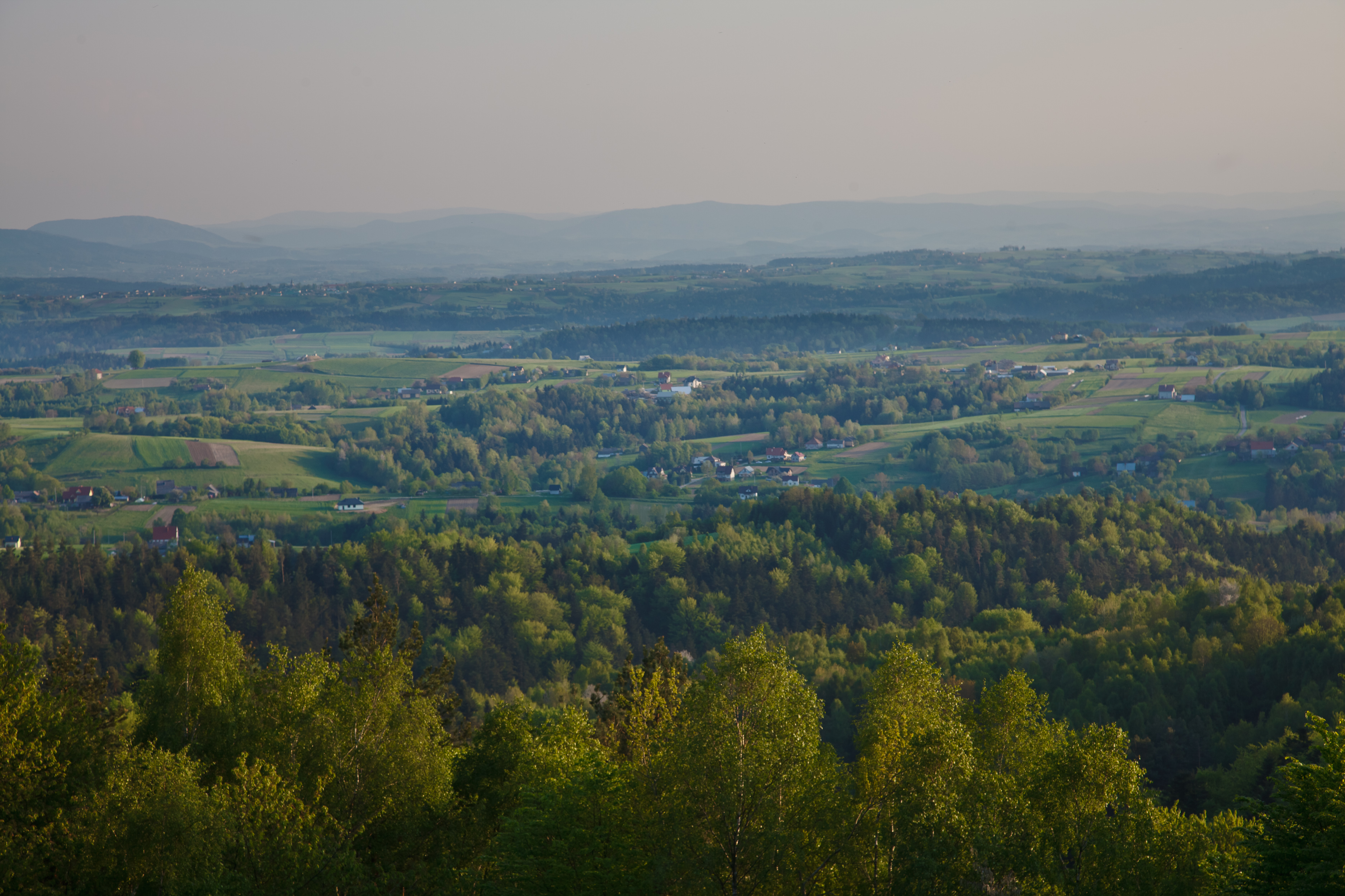 Widok z wieży widokowej w Jodłówce Tuchowskiej na południową część Parku Krajobrazowego Pasma Brzanki.